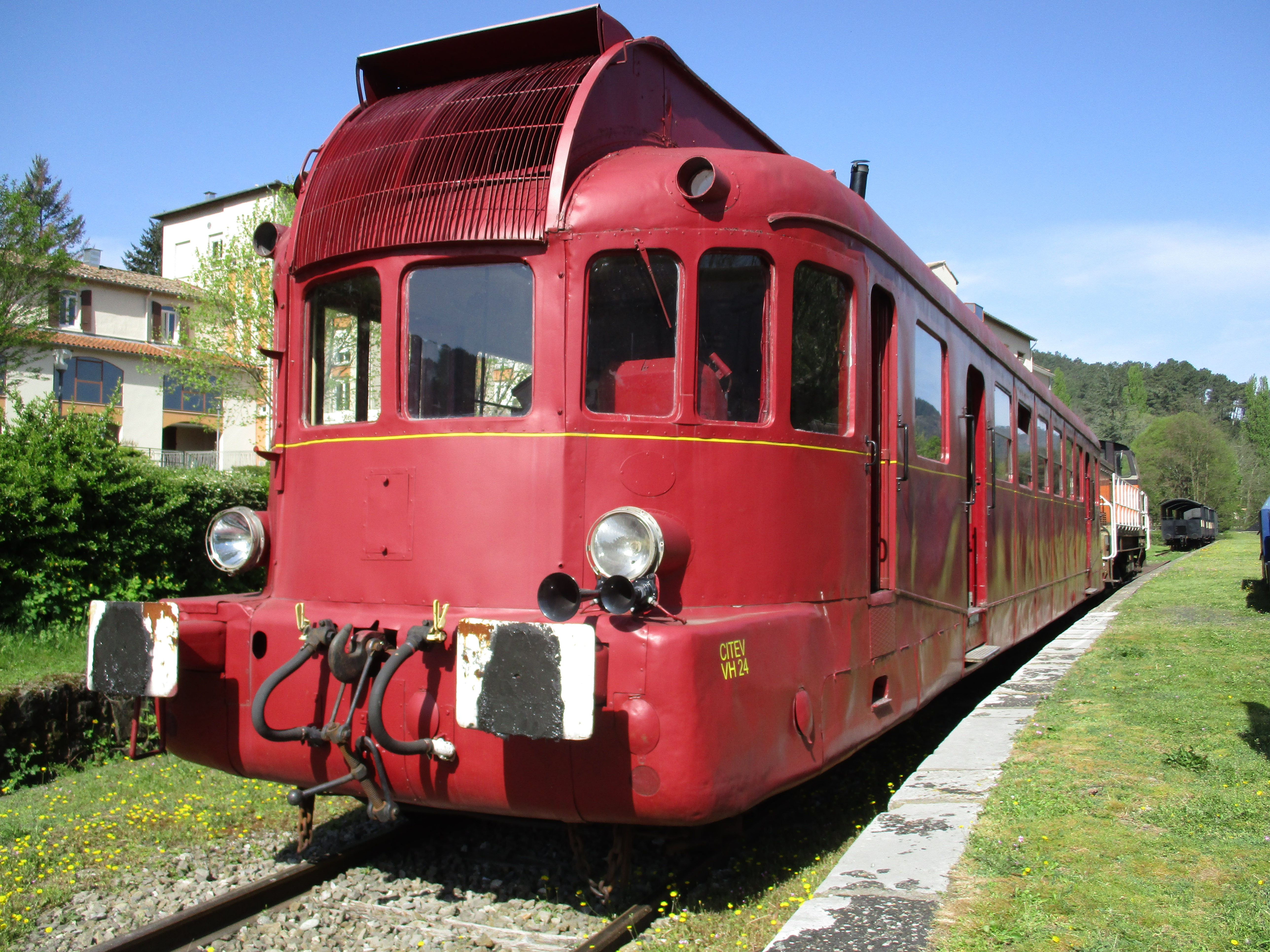 Autorail VH24 de la Citev